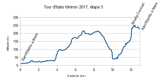 Profil de la 5e étape du Tour d'Italie féminin 2017